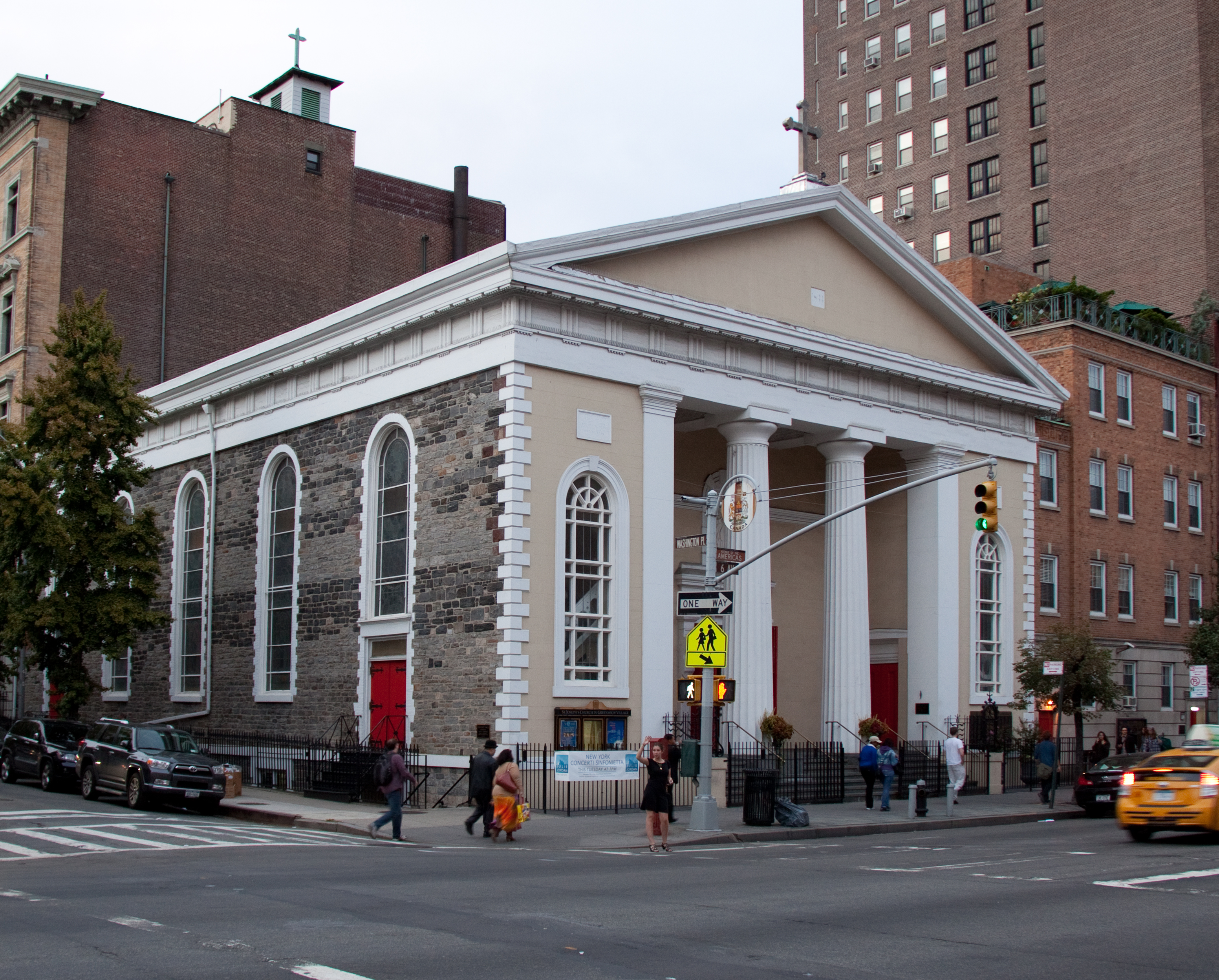 St Josephs church in Greenwich Village